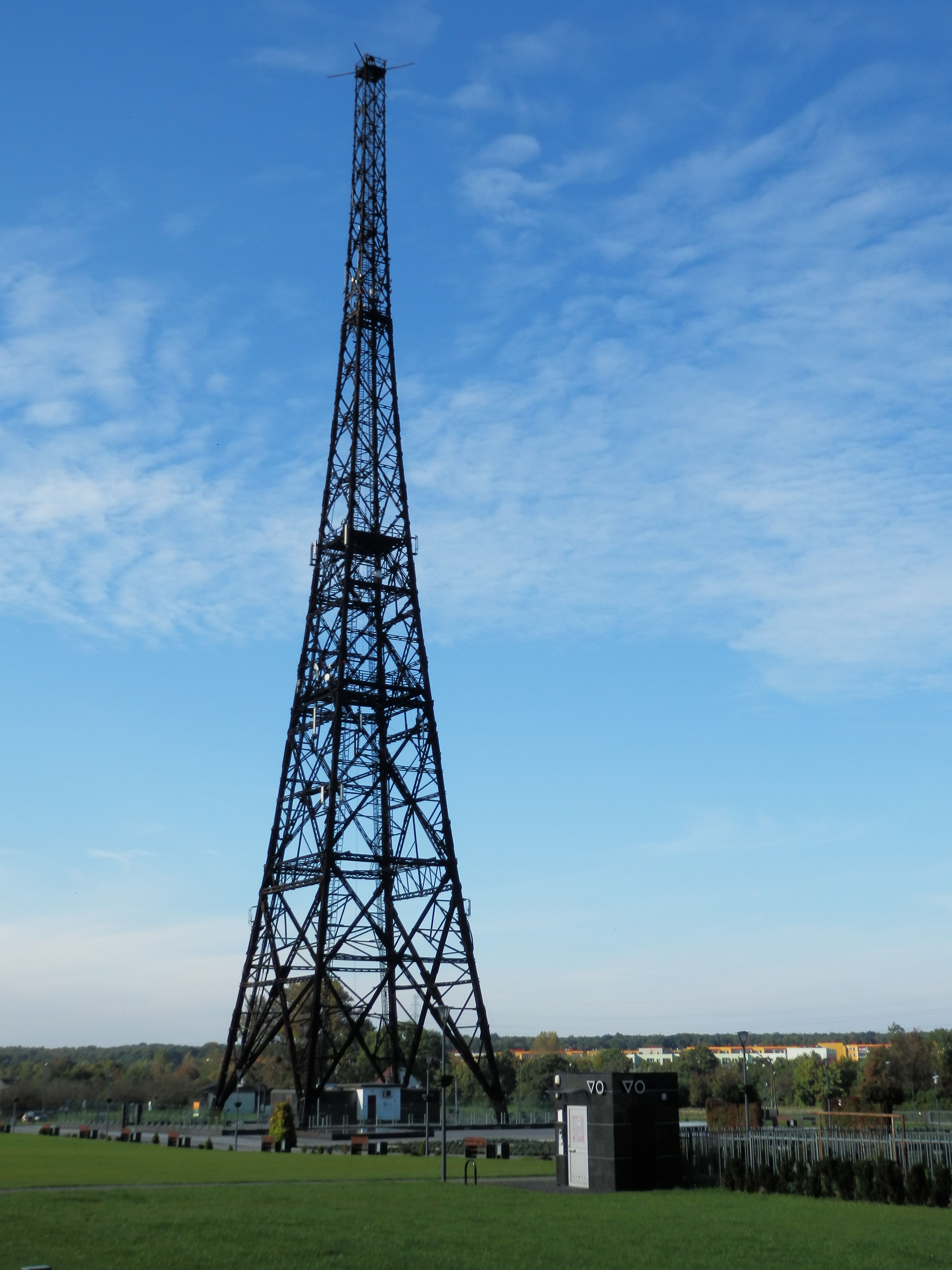 Gliwice, maszt radiostacji, 1934-1936